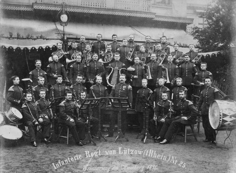 Infanterie Reg. von Lützow (1 Rhein.) No 25. Erinnerung an Hamburg 1891